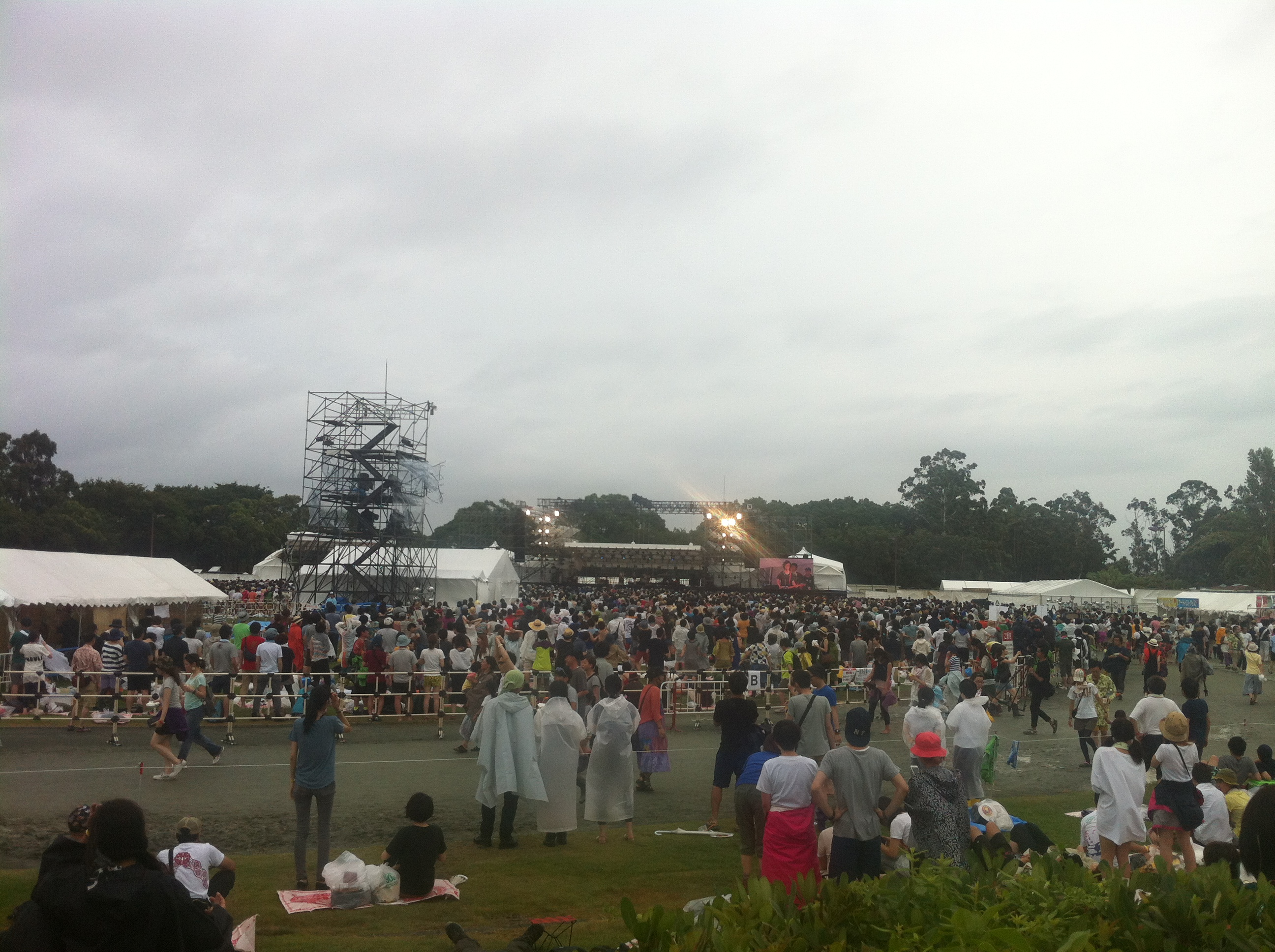 ワールドハピネスフェスティバルでくるりのライブ Quruli performing at World Happiness Festival